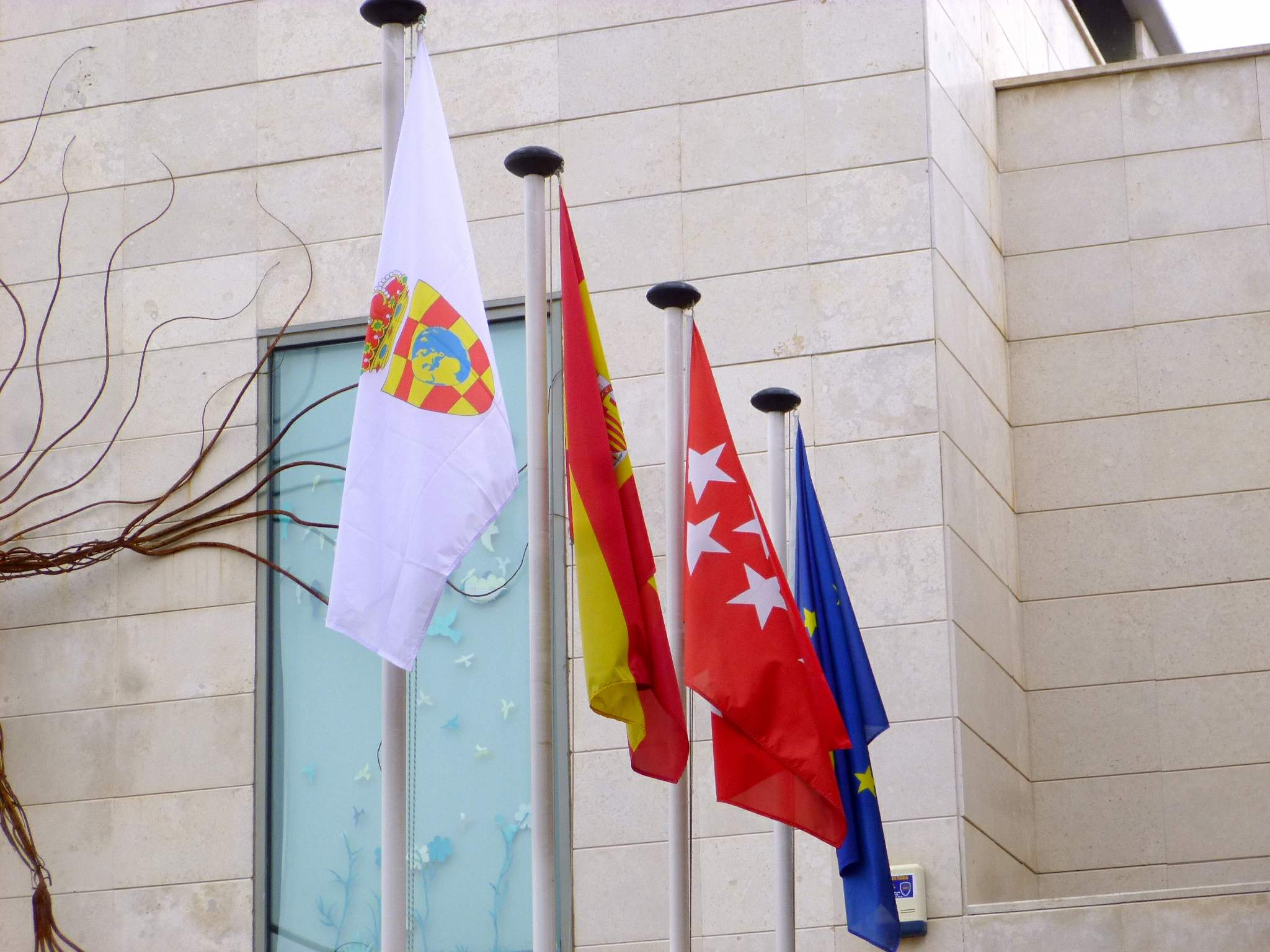 Centro Cultural Infanta Cristina (Casa de la Cadena), en Pinto (Madrid)